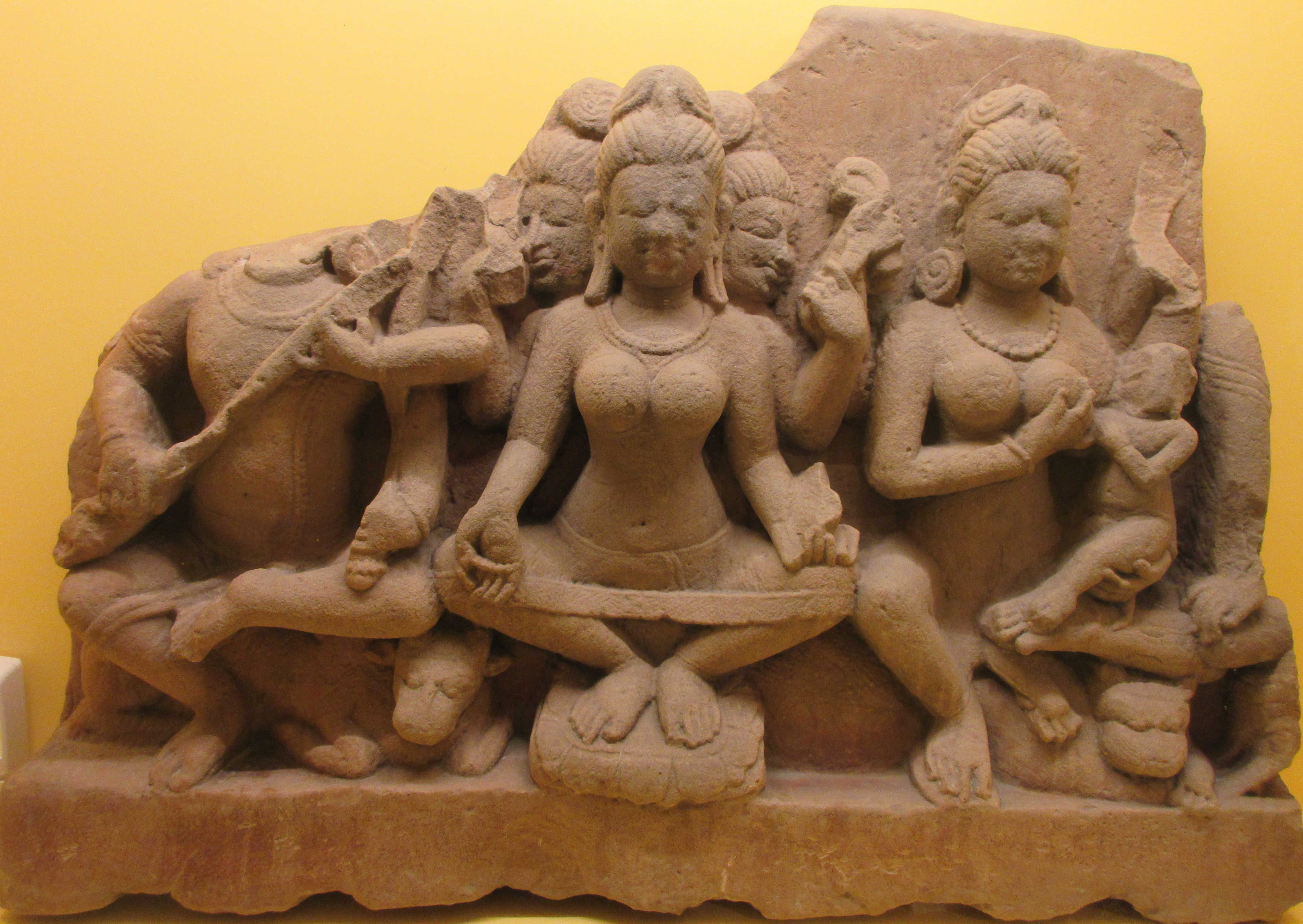 Shiva auf Steinrelief mit Muttergottheit, 9. Jh. nach Chr., Nordindien, Museo Archeologico (Milano)